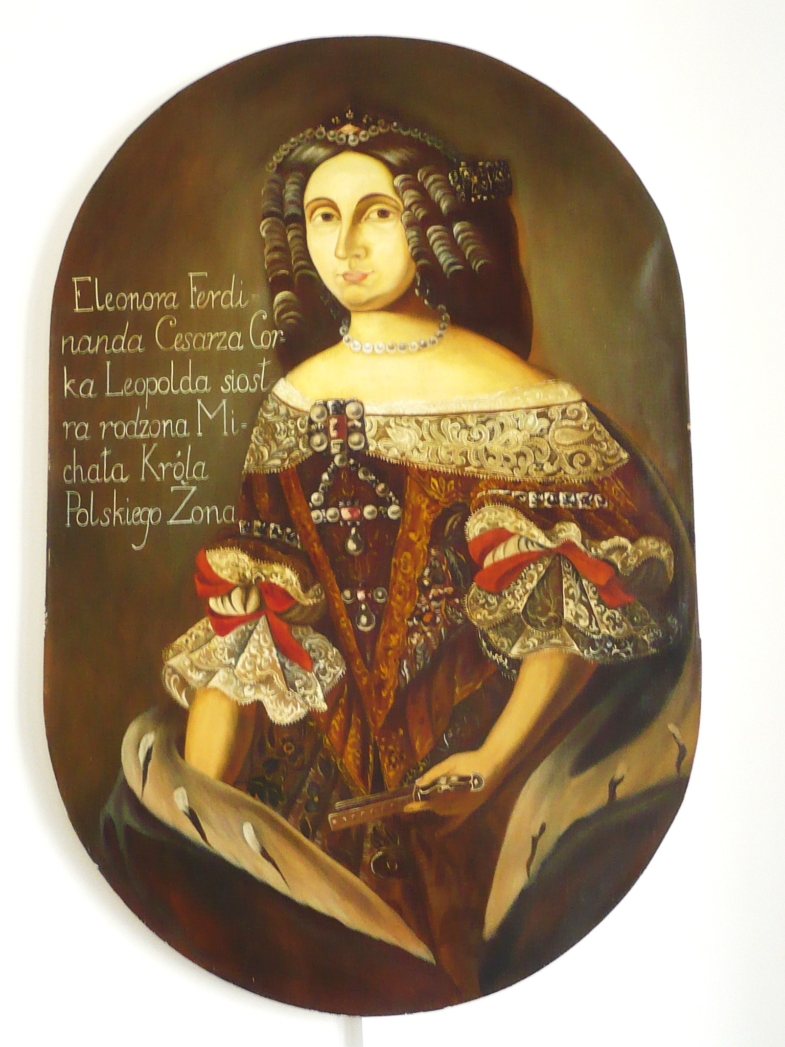 Wiśniowiec, obraz